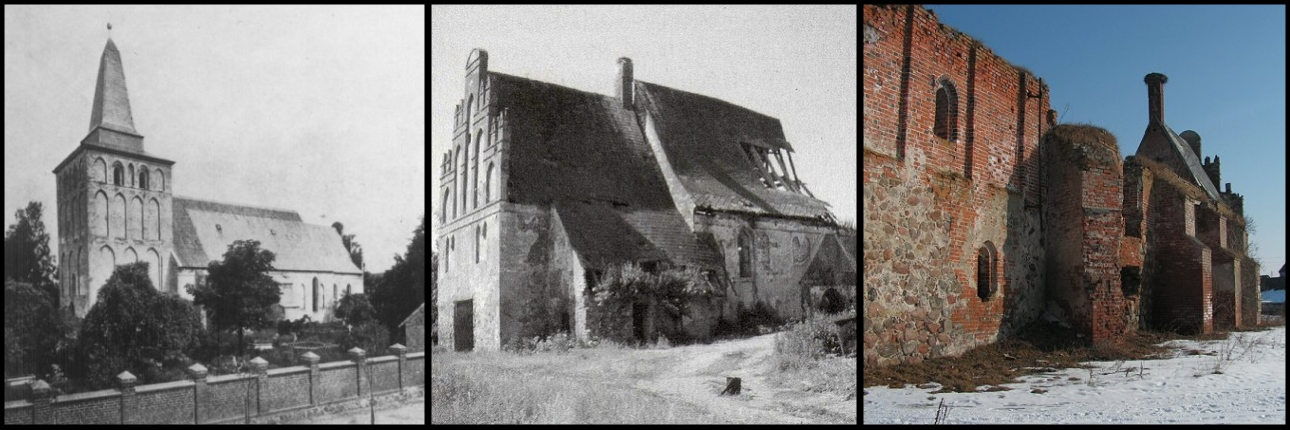 Романовская кирха; до военное время, 1992 год, современный вид соответственно.